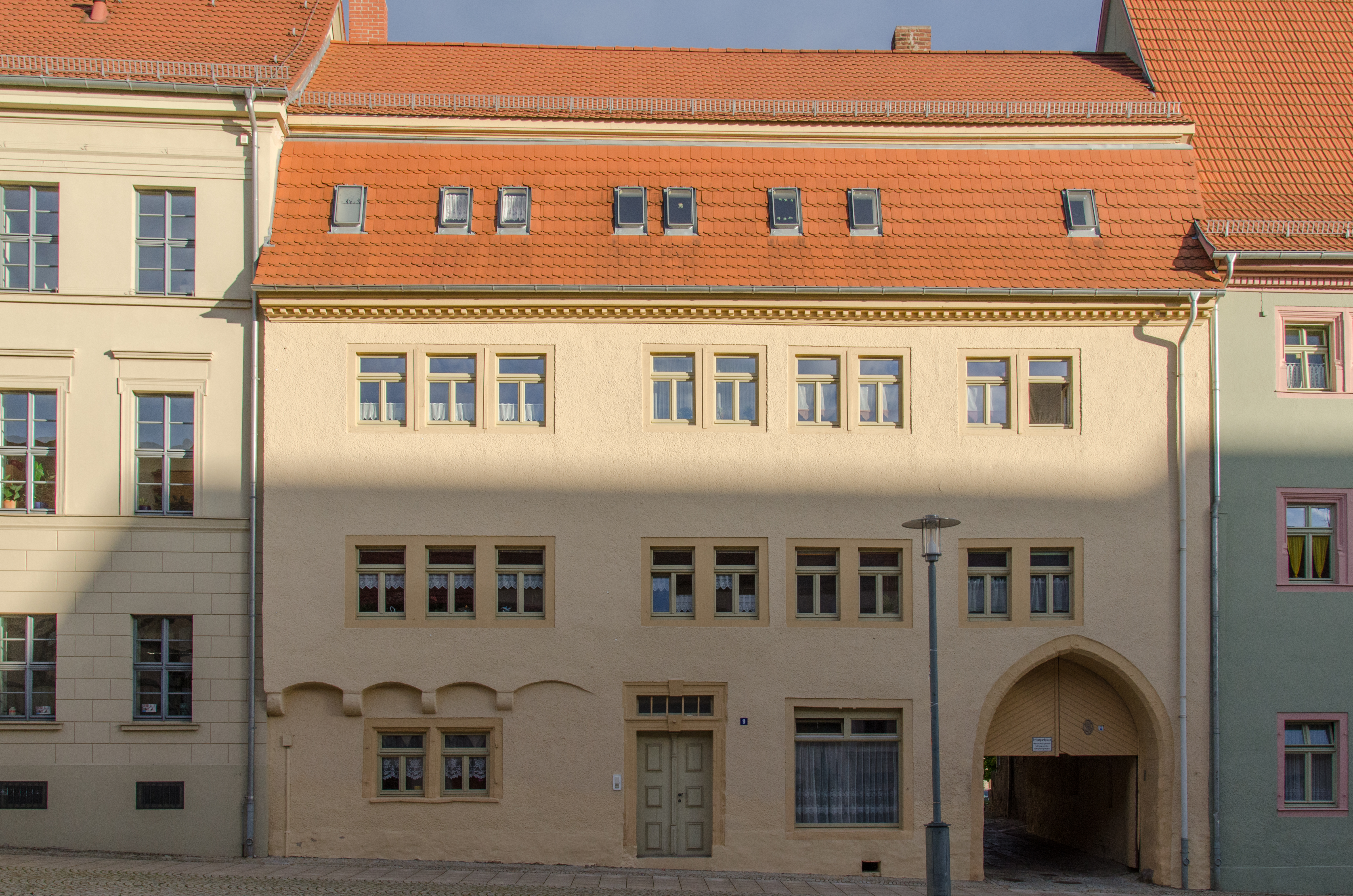 Sangerhausen, Markt 9